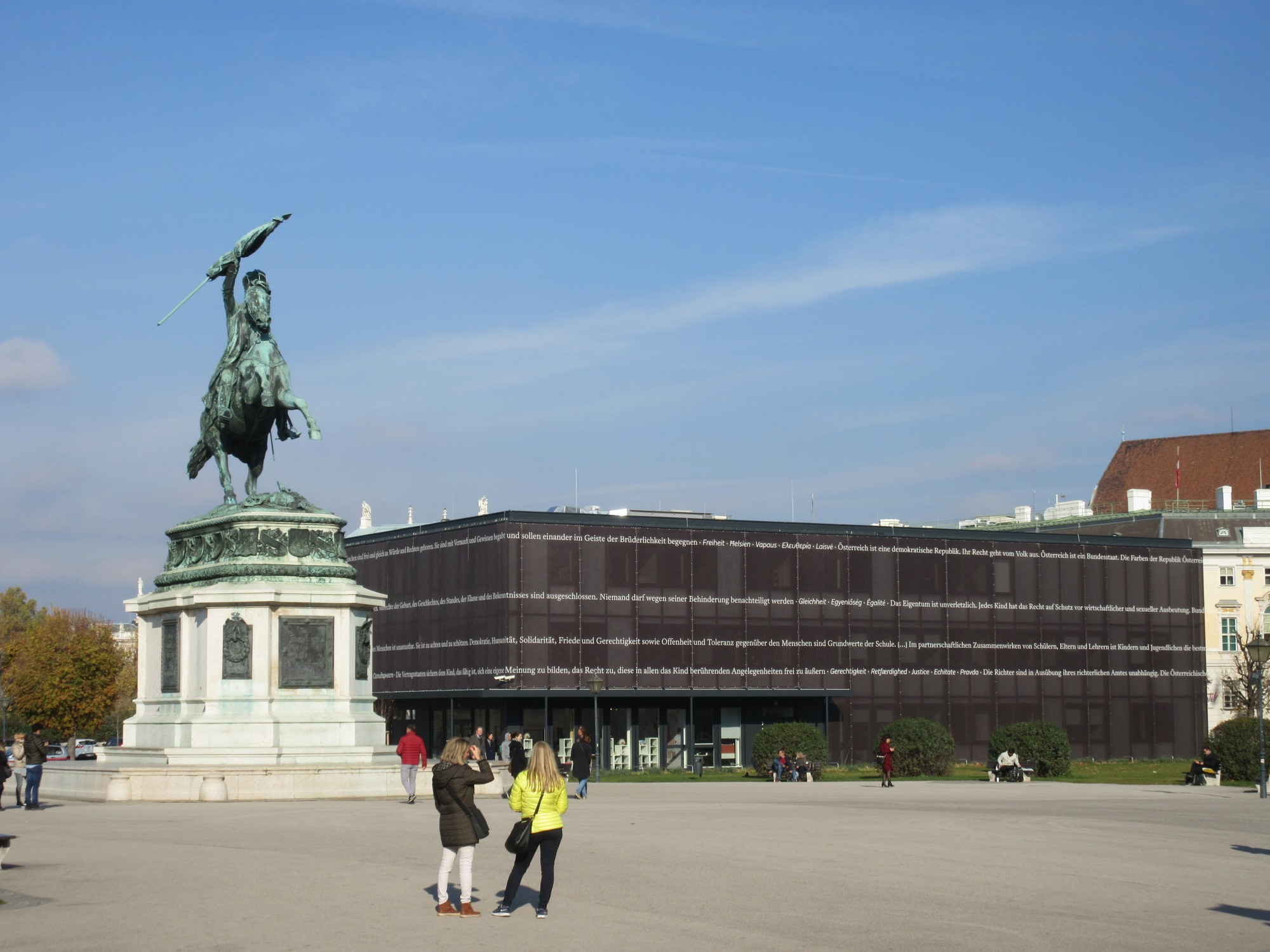 Pavillon Burg am Heldenplatz (temporäre Ausweichquartiere während der Sanierung des Hauses am Ring), mit dem Erzherzog-Karl-Denkmal.